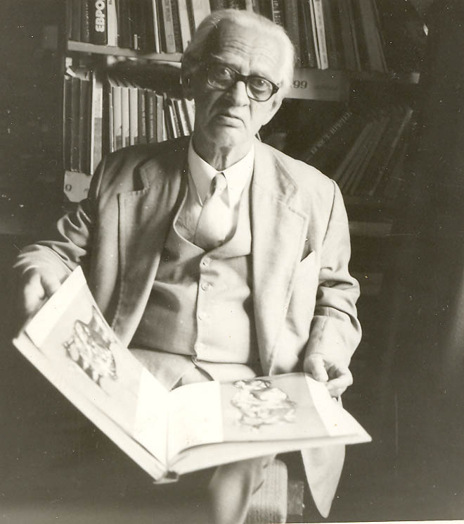 a bulgarien archaeologist Ivan Venedikov